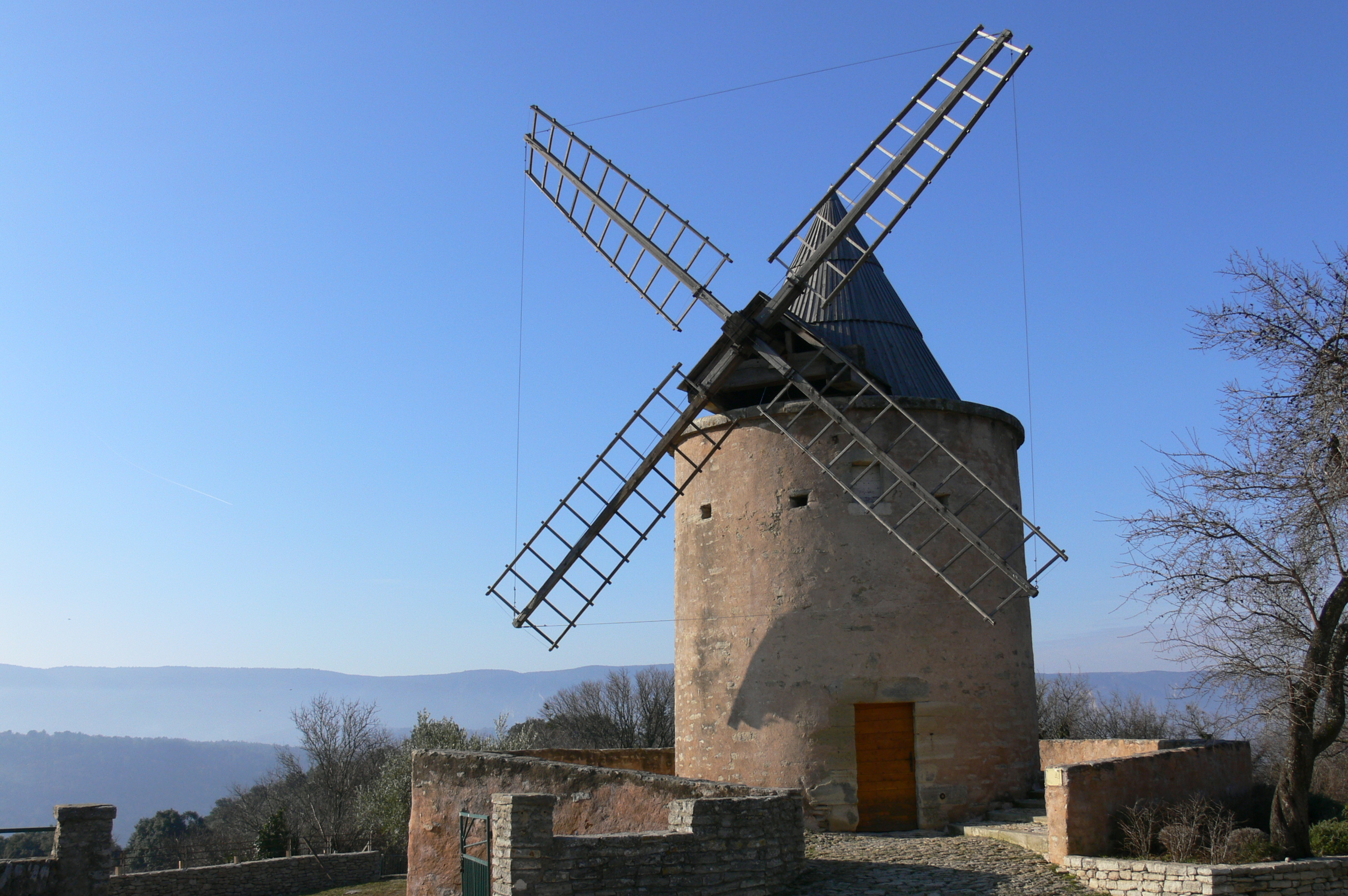 Moulin